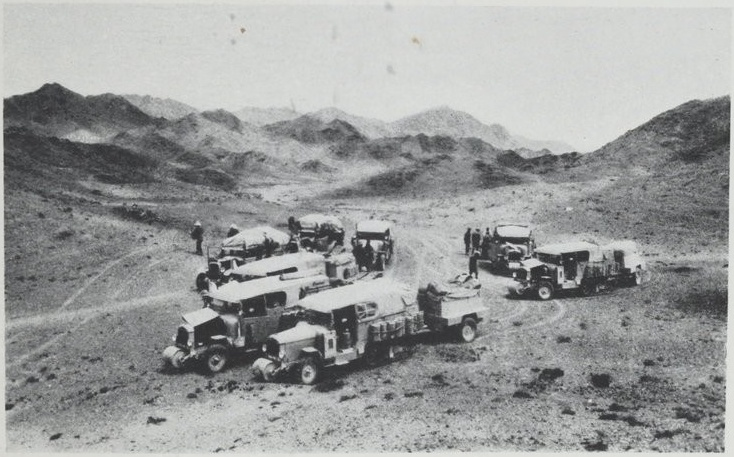 Photographie publiée dans le numéro de décembre de la revue La Géographie à l'occasion de divers compte-rendus de l'expédition. Sous-titre : Halte au col de Ming Shui, entrée du Turkestan Chinois en venant de l'Est. Expédition Centre-Asie Citroën (1931-1932).